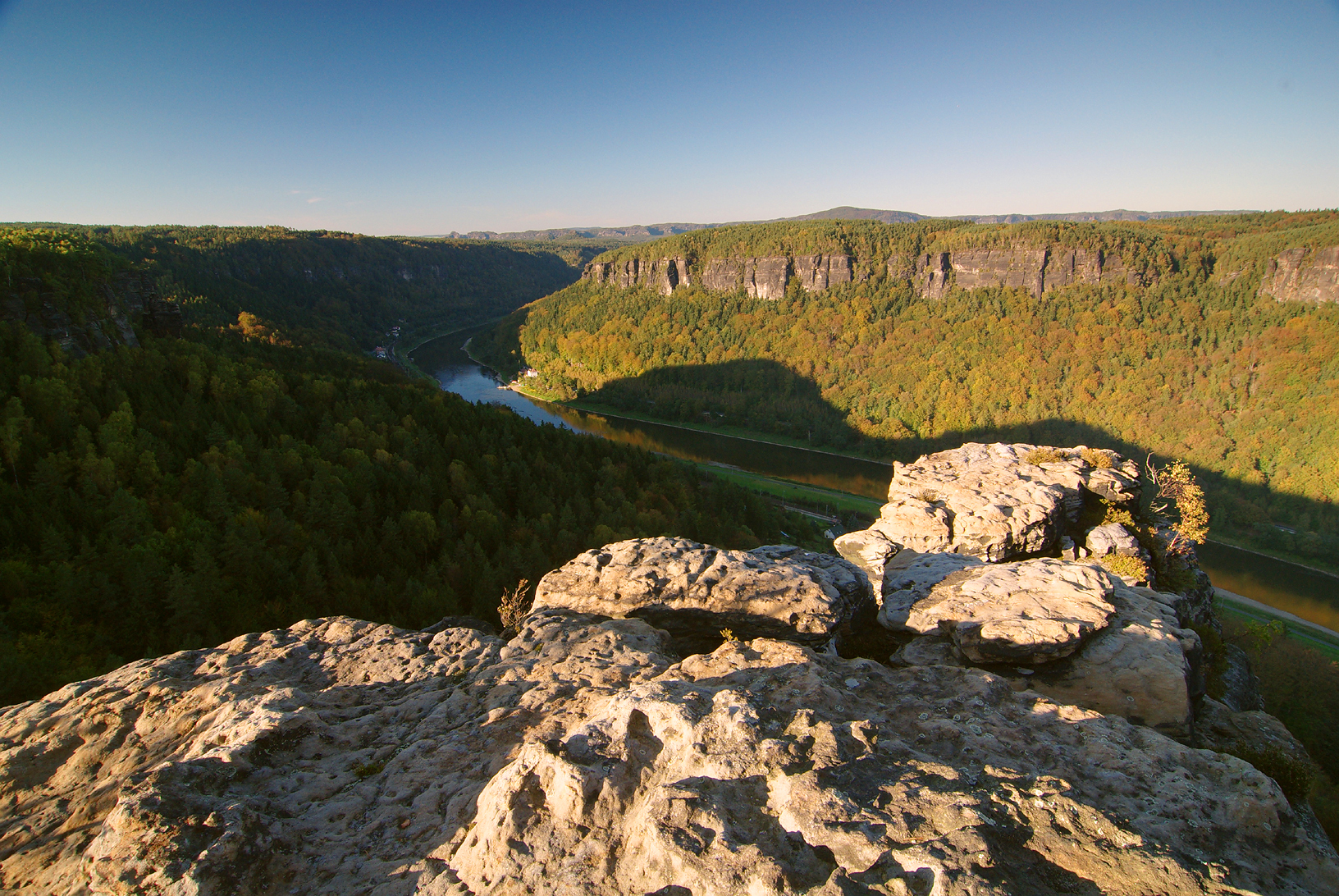 Pohled na Labe u nad Dolním Žlebem